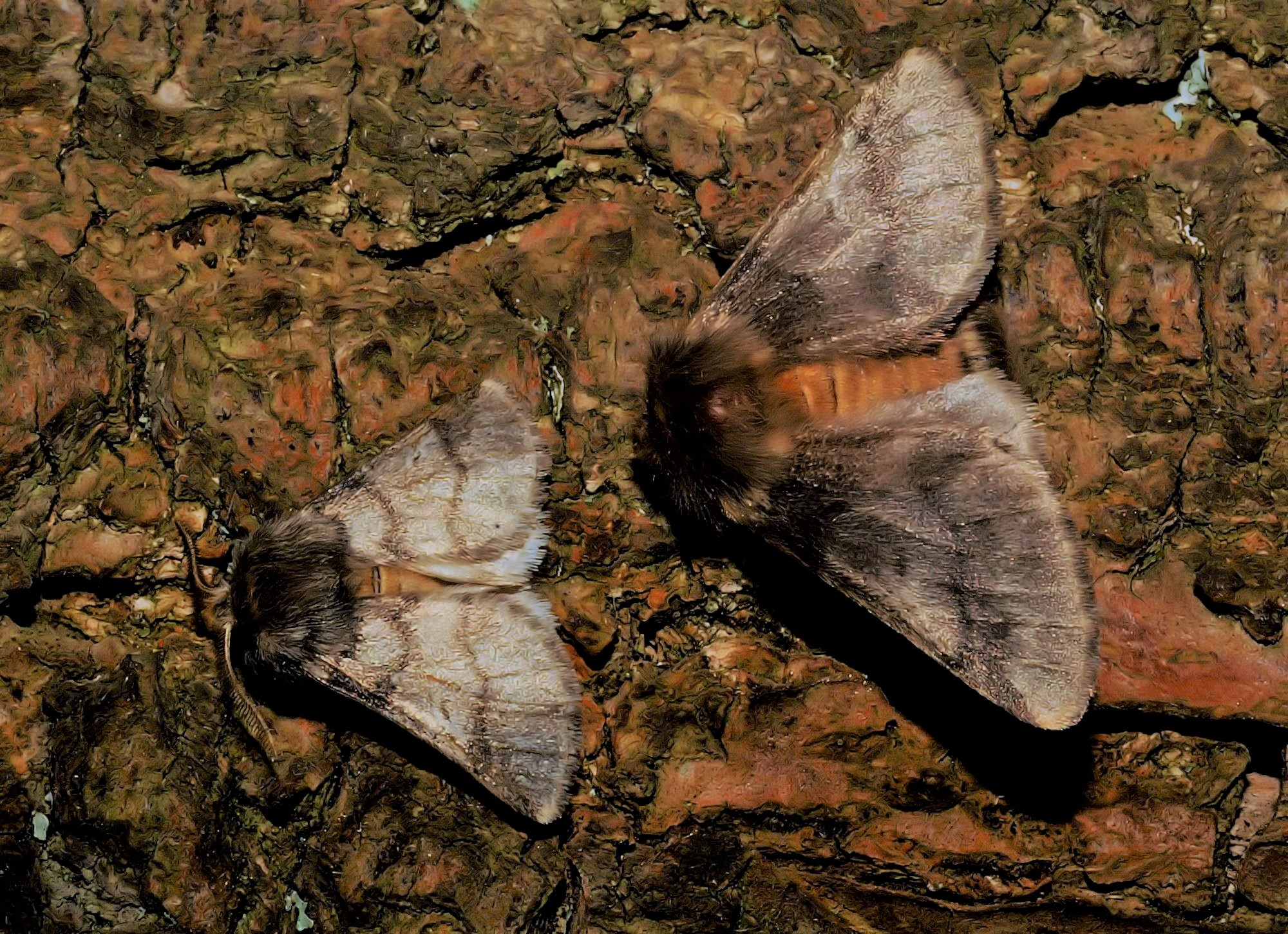 Thaumetopoea processionea